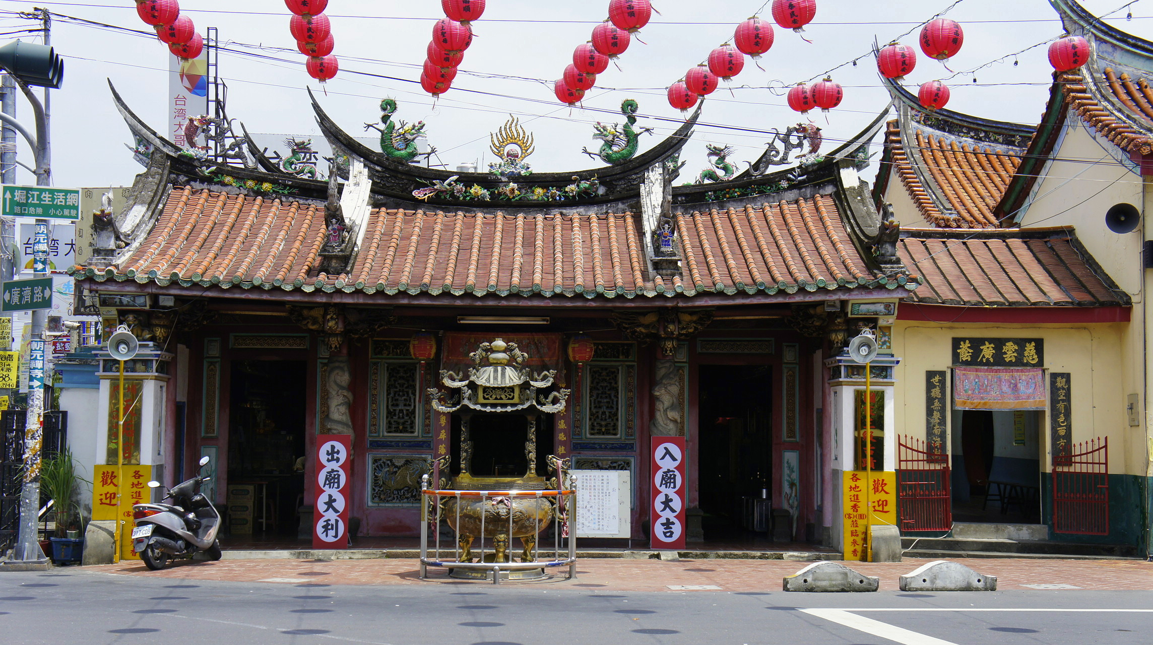 六堆天后宮。